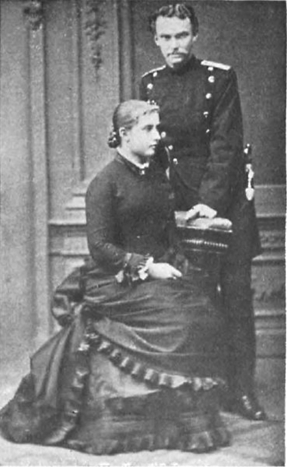 Bernhard III. Friedrich Wilhelm Albrecht Georg von Sachsen-Meiningen (1851-1928) mit seiner Braut Charlotte von Preußen, um 1877.